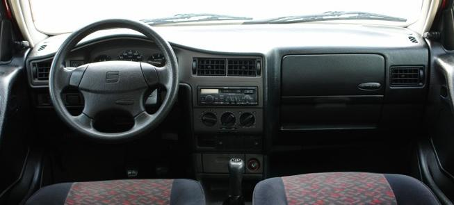 foto realizada con el movil